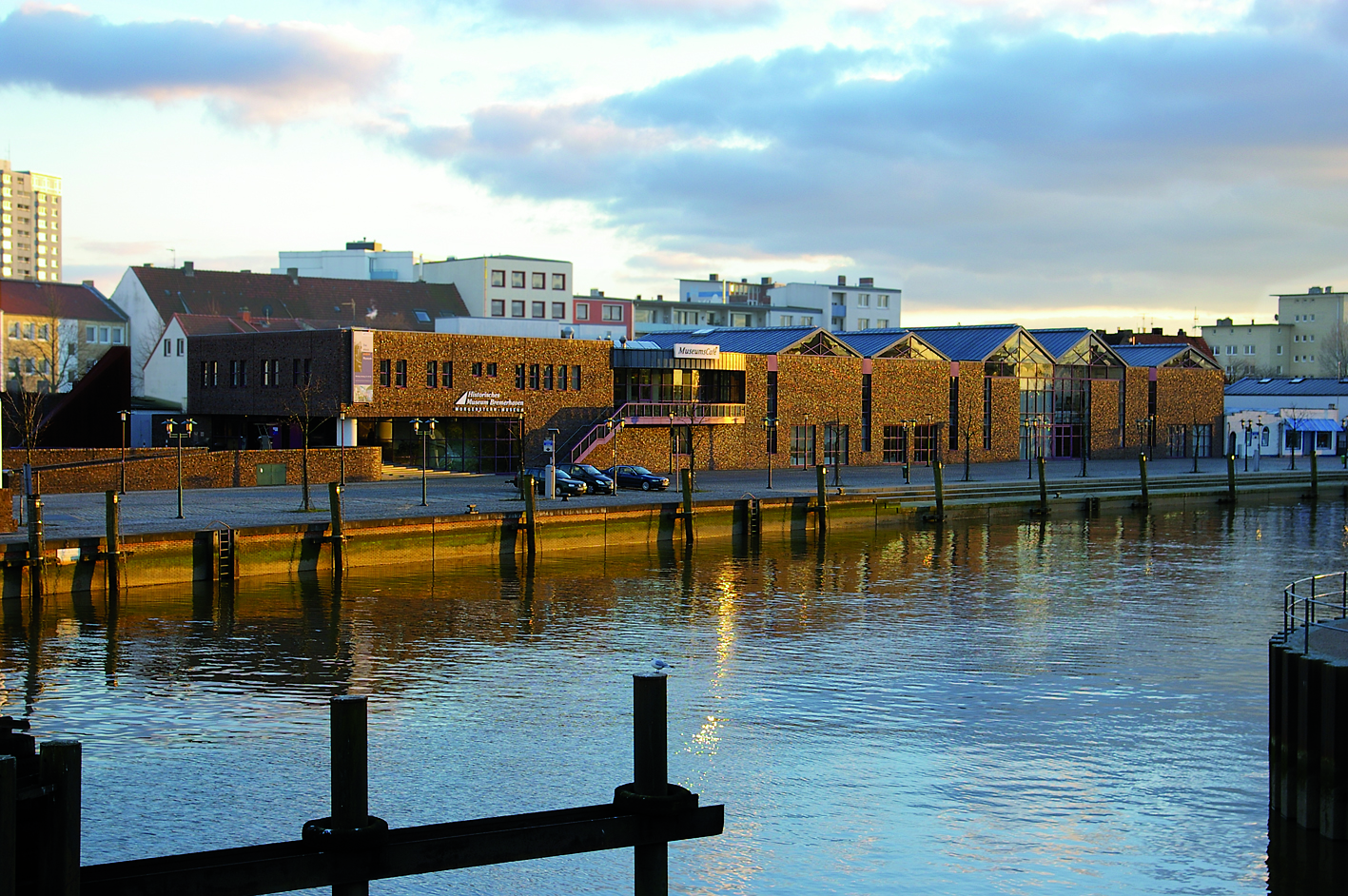 Außenansicht des Historischen Museums Bremerhaven